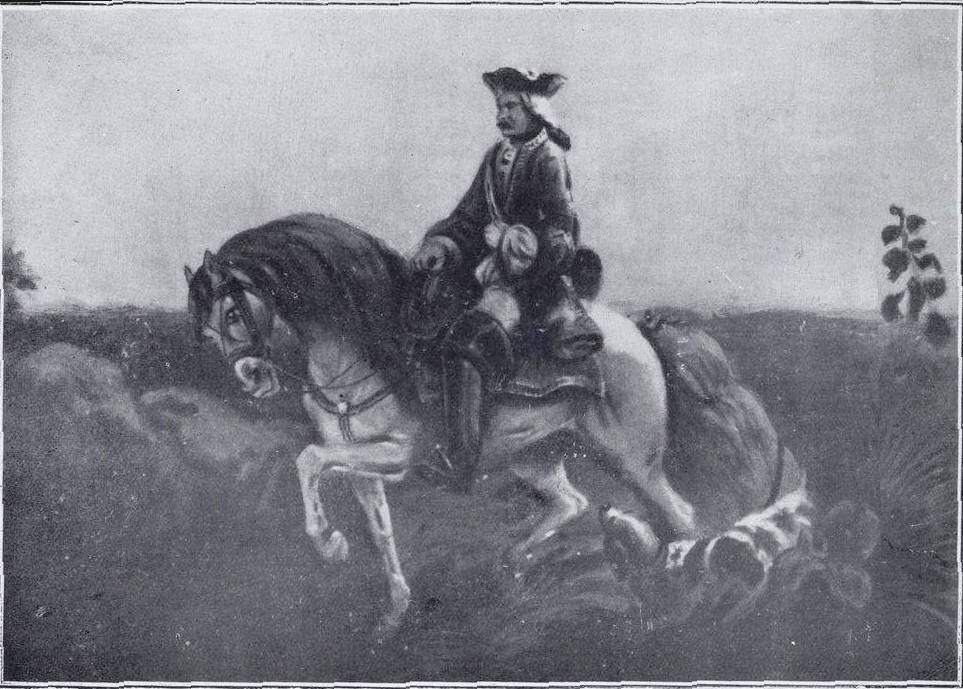 Seigneur breton partant à la chasse. Reproduction d'un tableau donné au musée d'Hennebont par M. Desjacques, vétérinaire principal des haras. Reprouction d'un tableau ancien dans l'ouvrage d'Antoine-Auguste (Commandant) Saint-Gal de Pons, Origines du cheval breton. Le Haras de Langonnet. Les Dépôts de Lamballe et d'Hennebont. Le Dépôt de remonte de Guingamp, Quimper, Celjoarion, 1931